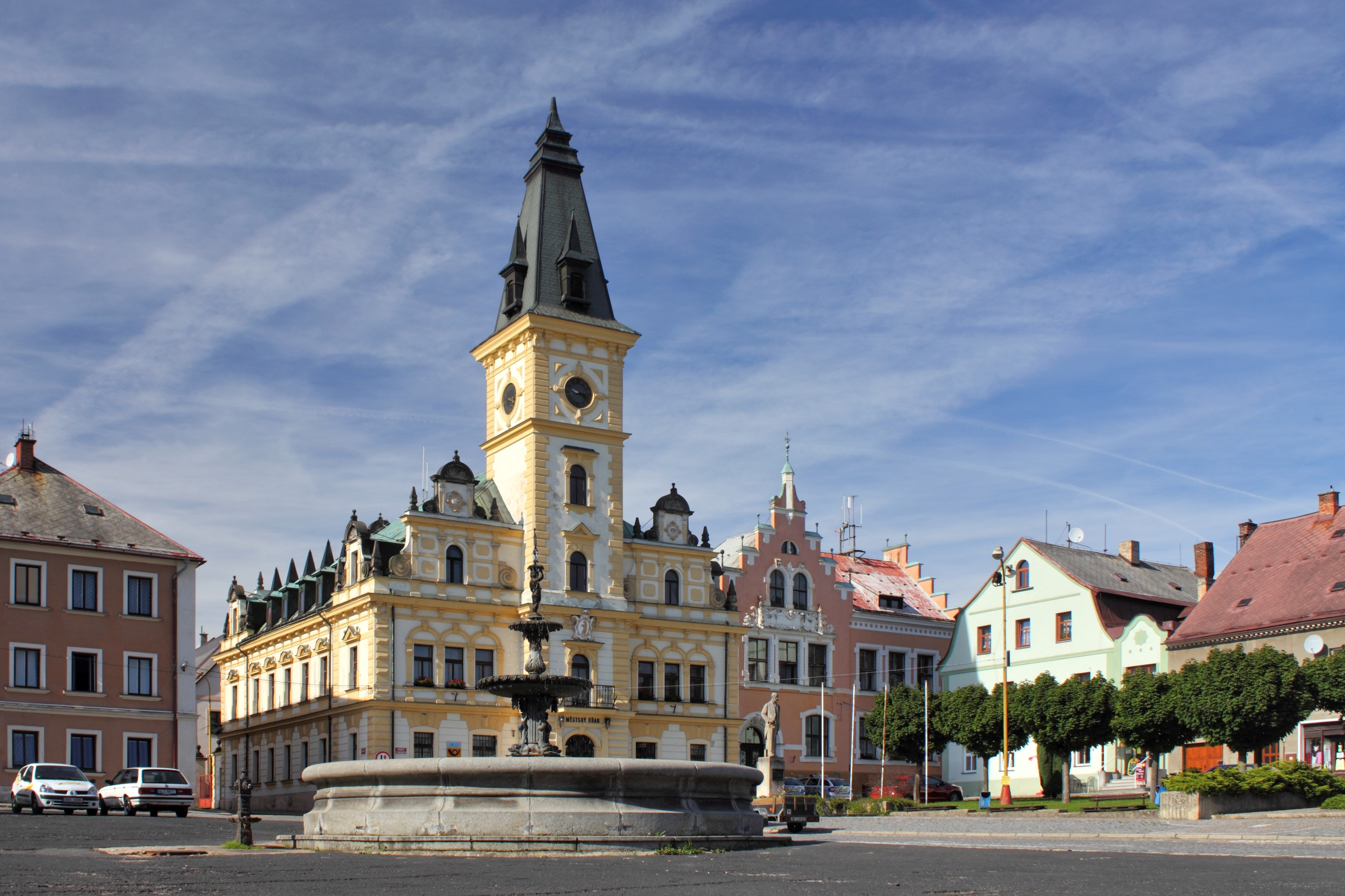 Námeěstí T. G. Masaryka, Hodkovice nad Mohelkou s radnicí